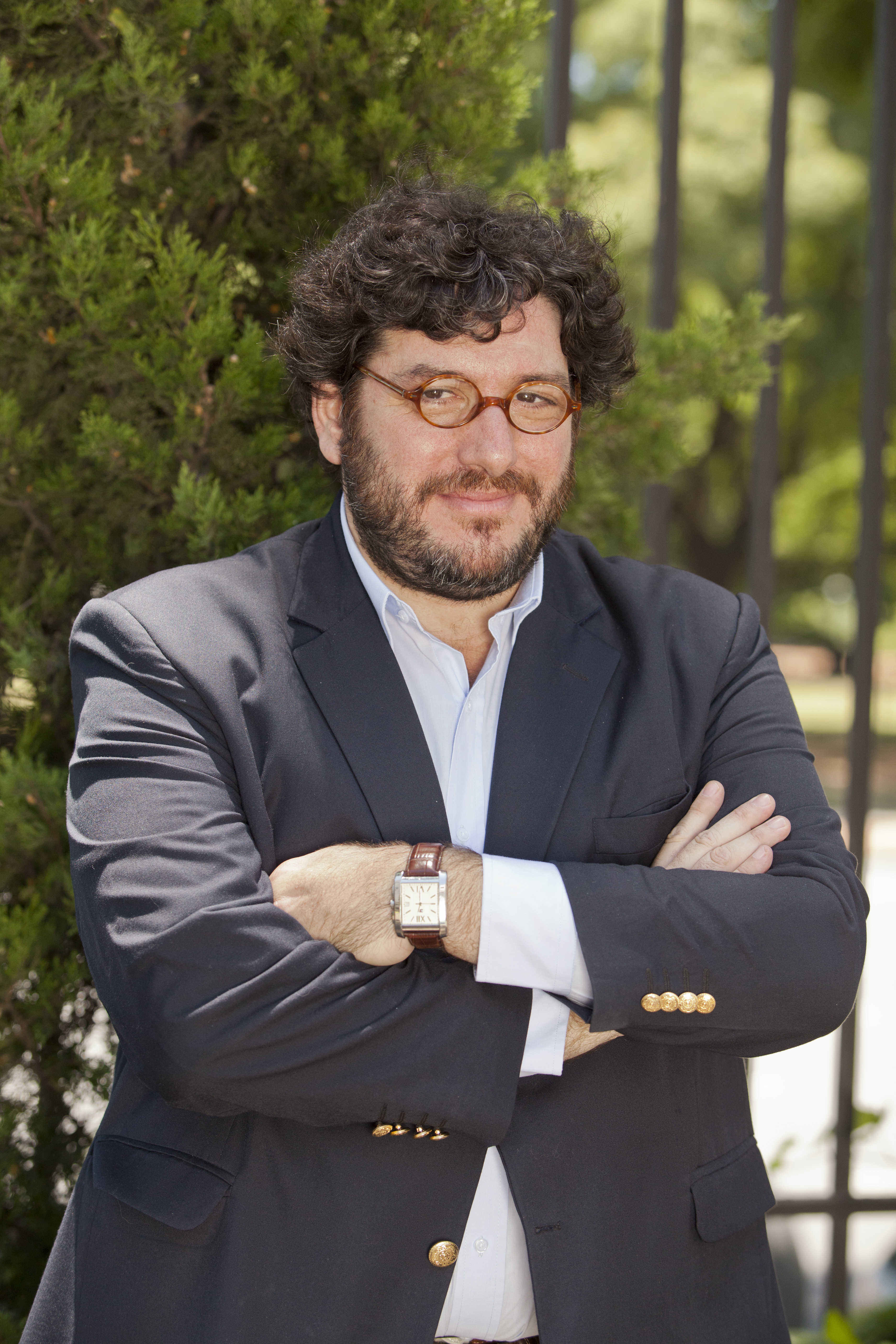 Pablo Avelluto, Ministro de Cultura de la República Argentina